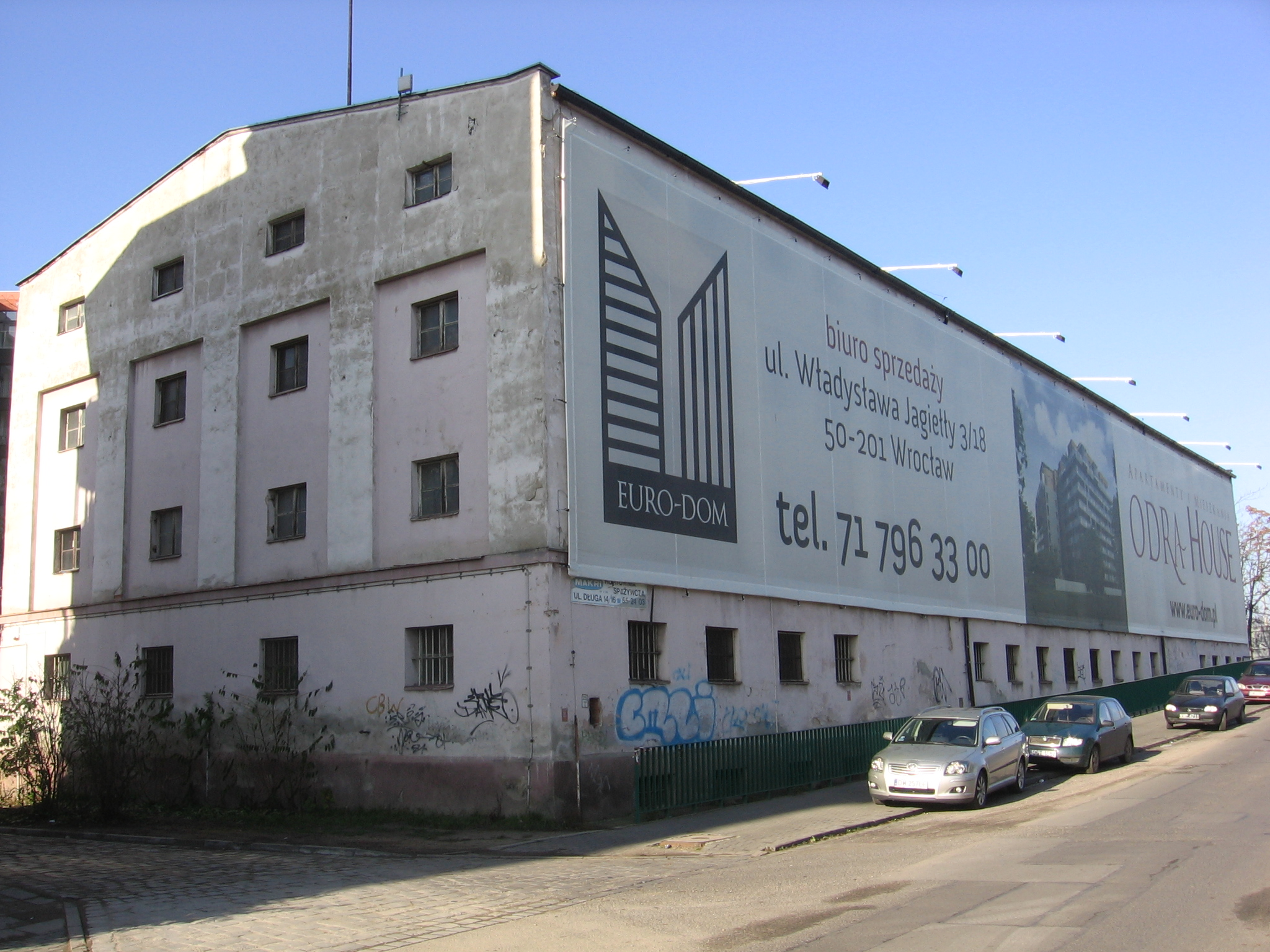 budynek przy ul. Długiej 14-16 we Wrocławiu, obecnie hurtownia spożywcza, dawniej (ok. 1830 r.) spichlerz